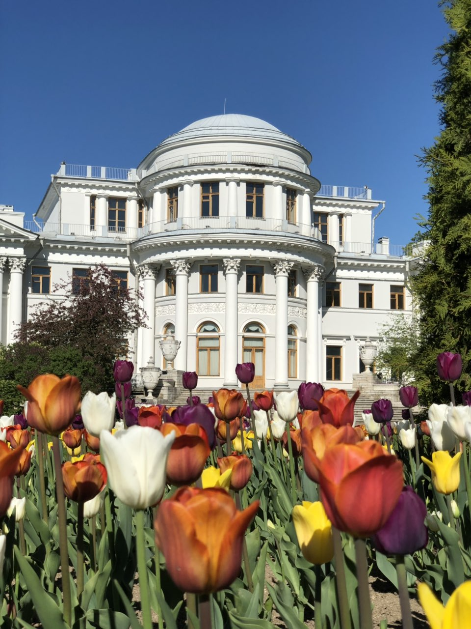 Flower beds in front of the palace